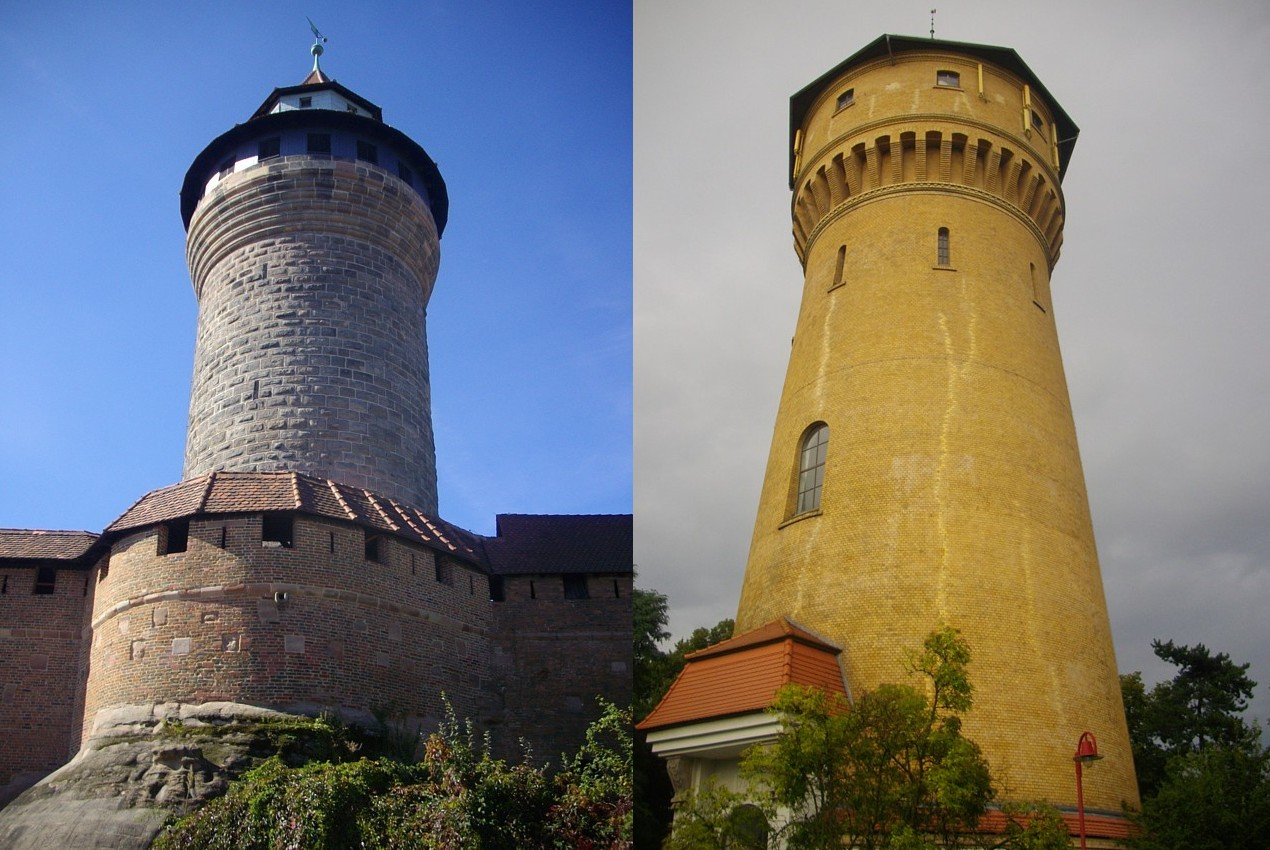 Im Vergleich: Turm der Nürnberger Burg - Wasserturm Pegau (Architekt: Otto Enke aus Nürnberg)